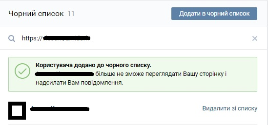 Соц. мережі